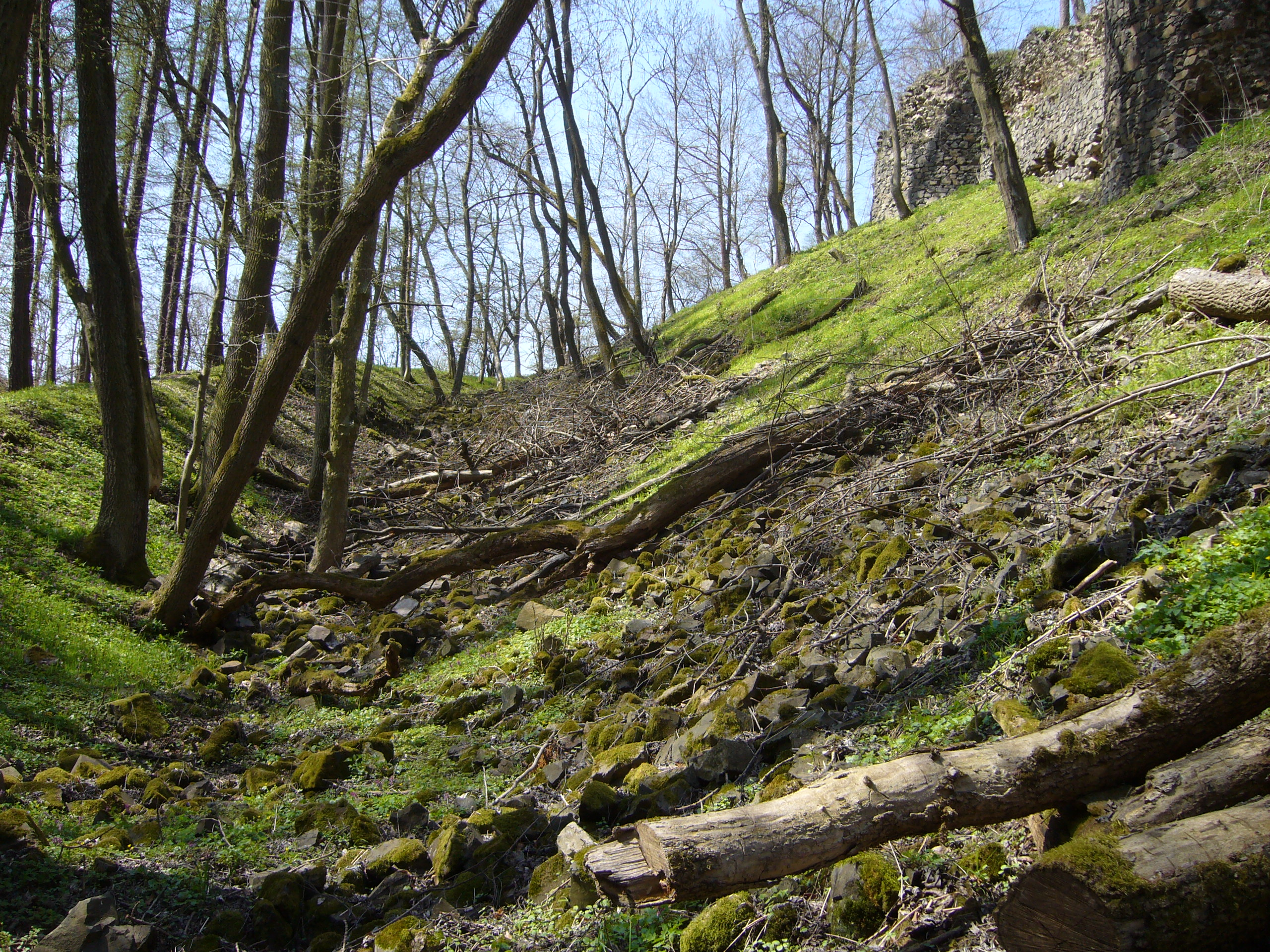 Jižní příkop, Hrad Týřov, Karlova Ves (okres Rakovník).